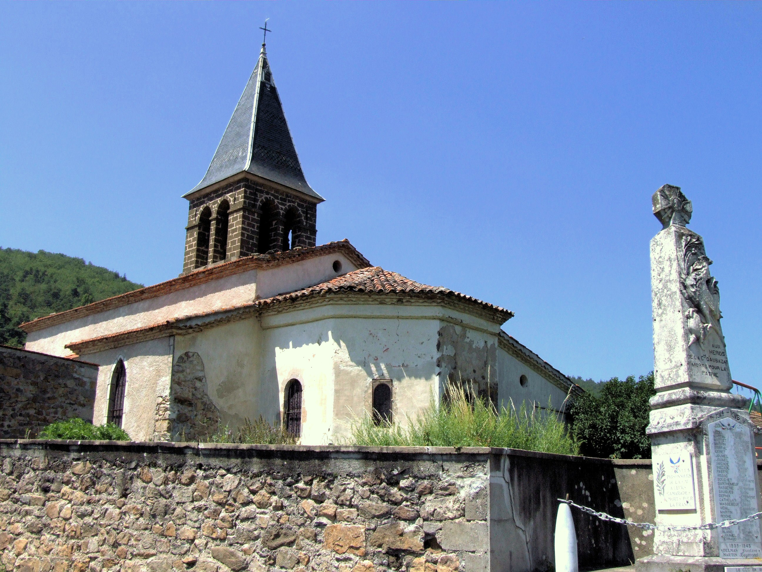 Aubazat - Eglise Saint-Roch et monument aux morts